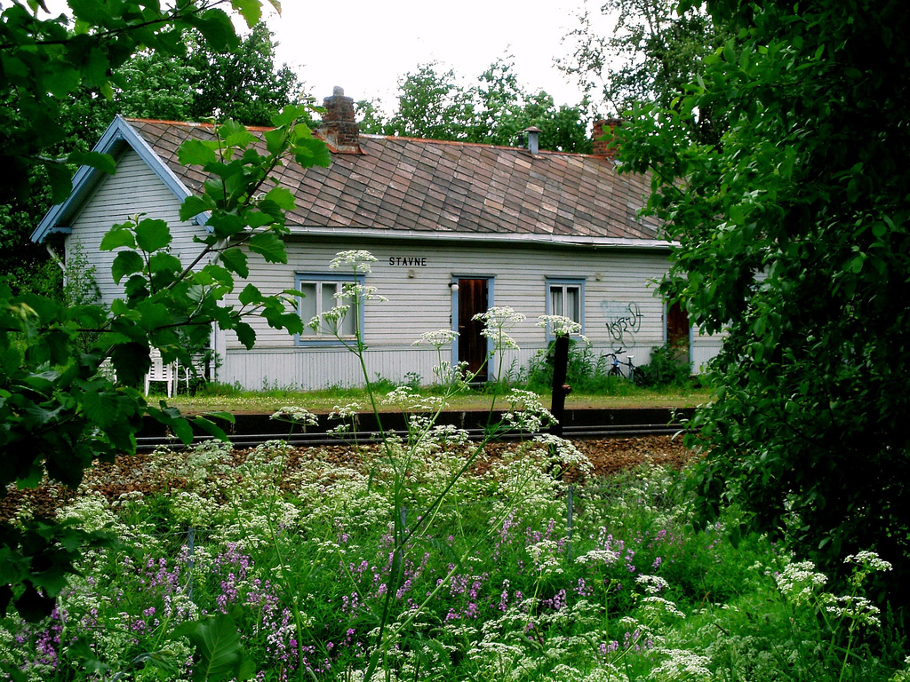 Stavne stoppested, Trondheim.